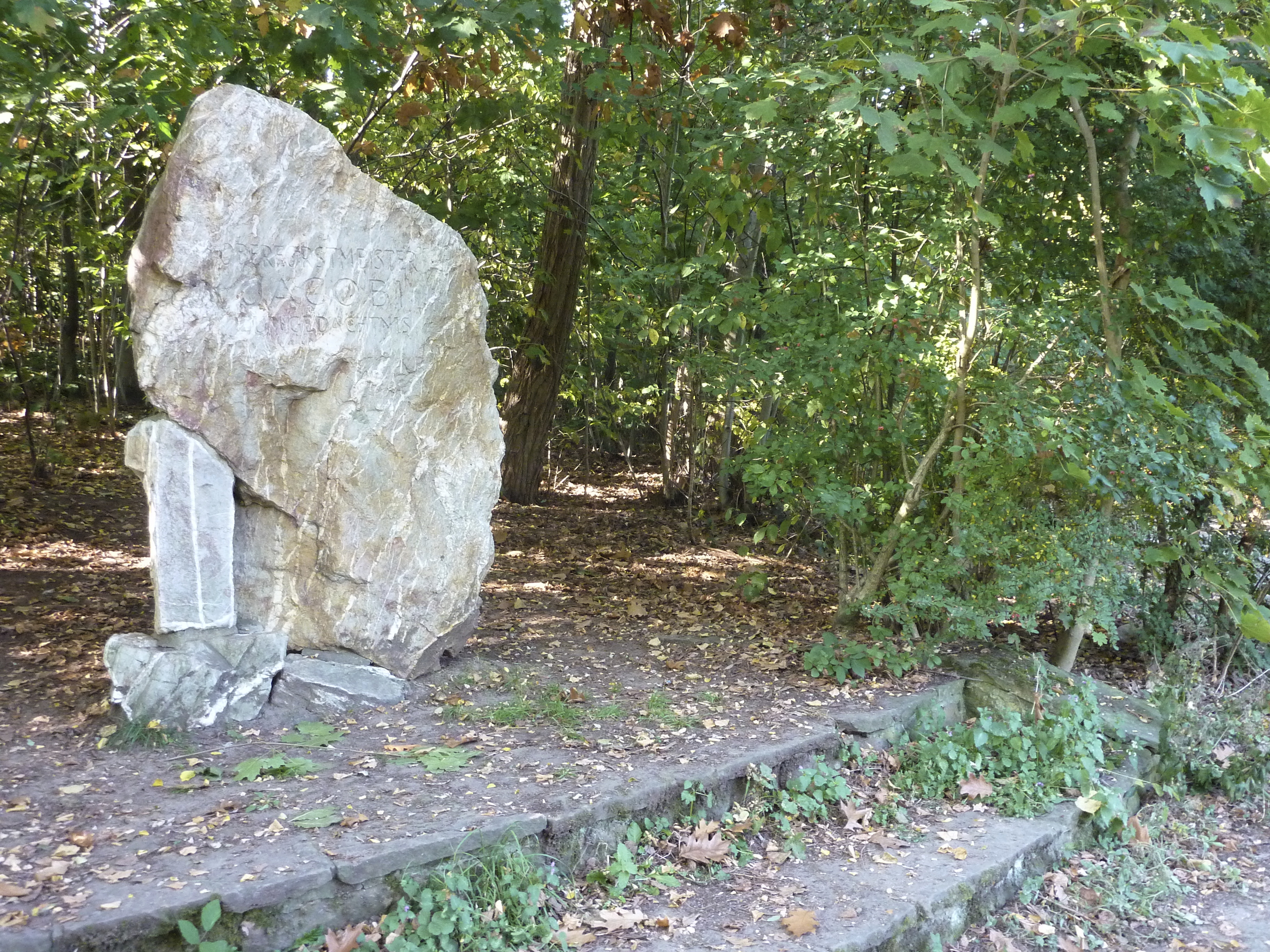 Frankfurt am Main, Stadtwald: Der Jacobiweiher auf dem Gebiet des Stadtteils Sachsenhausen wurde 1932 als Hochwasser-Rückhaltebecken angelegt. Mit einer Wasserfläche von sechs Hektar ist er Frankfurts größtes Stillgewässer. Das Foto zeigt den Gedenkstein für den Frankfurter Forstamtsleiter Hans Bernhard Jacobi (1886-1940), auf dessen Initiative und Konzept die Anlage des Gewässers beruht, das 1941 nach ihm benannt wurde.